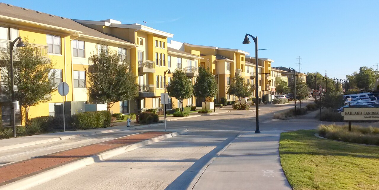 Viviendas en el centro histórico de la ciudad de Garland, ubicada al noreste de Dallas